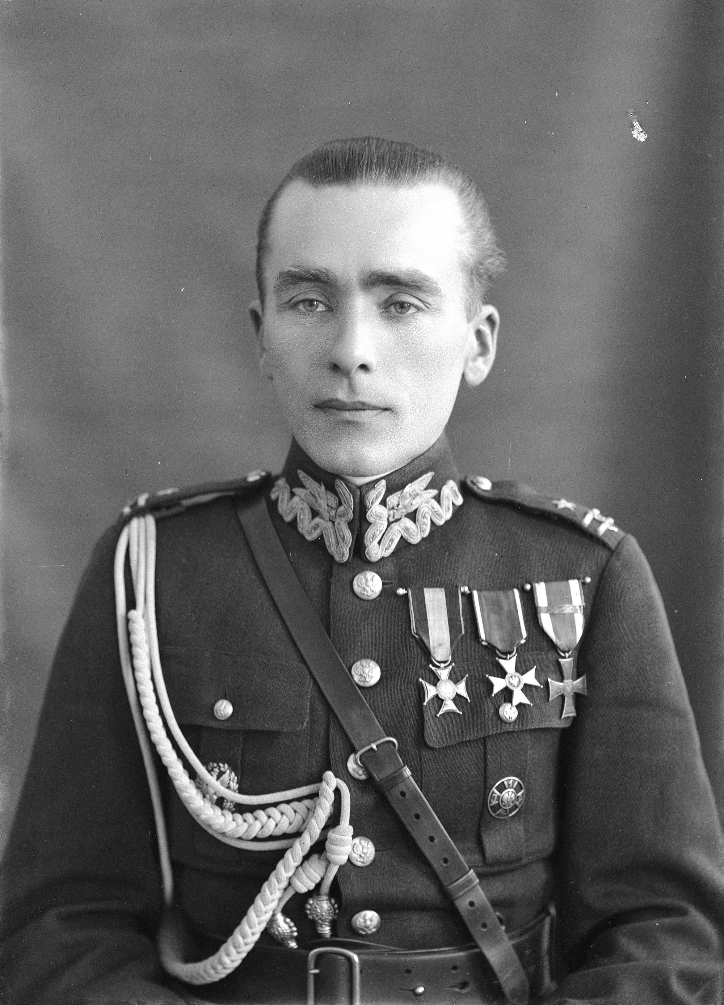 Portret (popiersie) - en face.